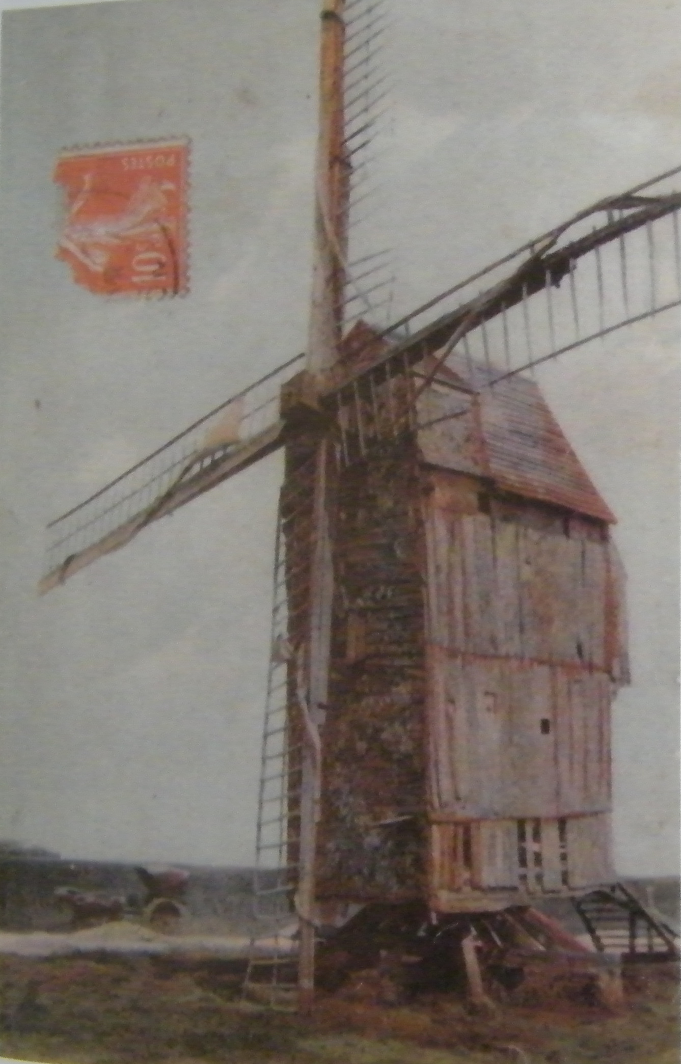 Arry, Somme, Fr, moulin disparu avant 1917, carte postale ancienne.